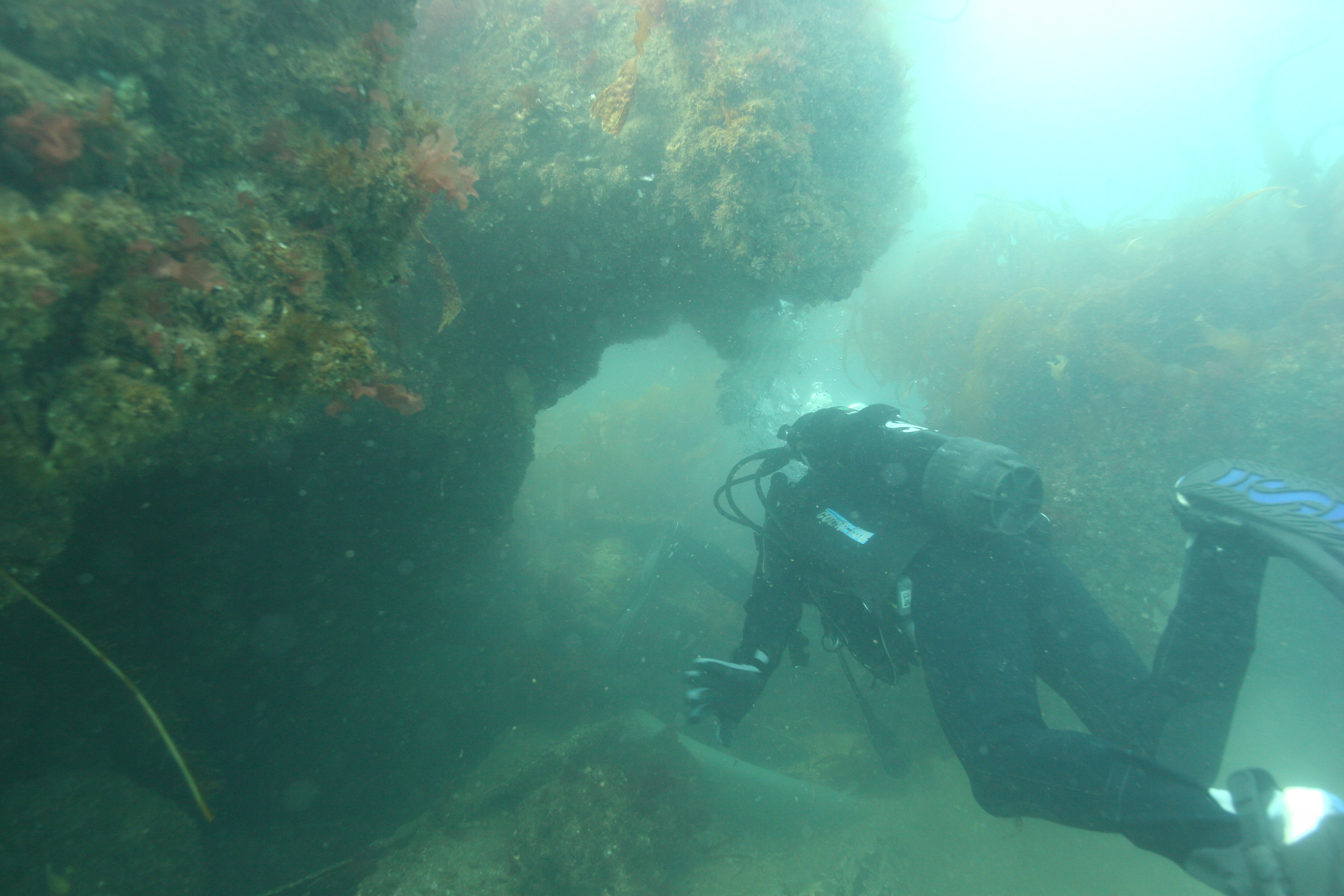 Köfunarleiðangur á flakið af Phönix 2011.